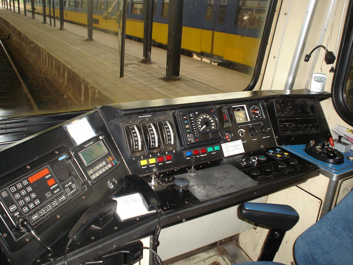 Cabine van DH-I 3101 Categorie:Afbeelding Nederlands spoorwegmaterieel